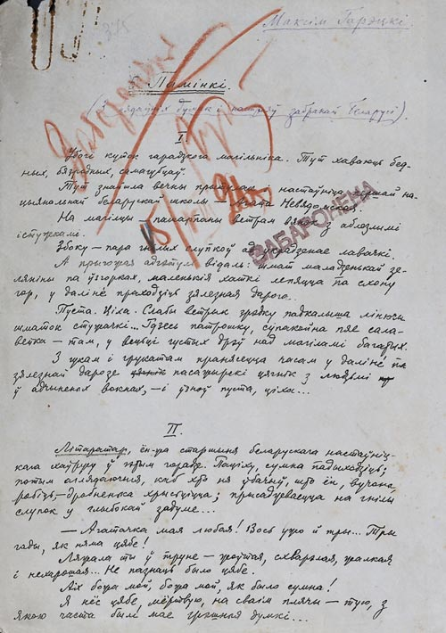 М. Гарэцкі. Драматычны абразок “Памінкі”. Аўтограф. 1922 г.